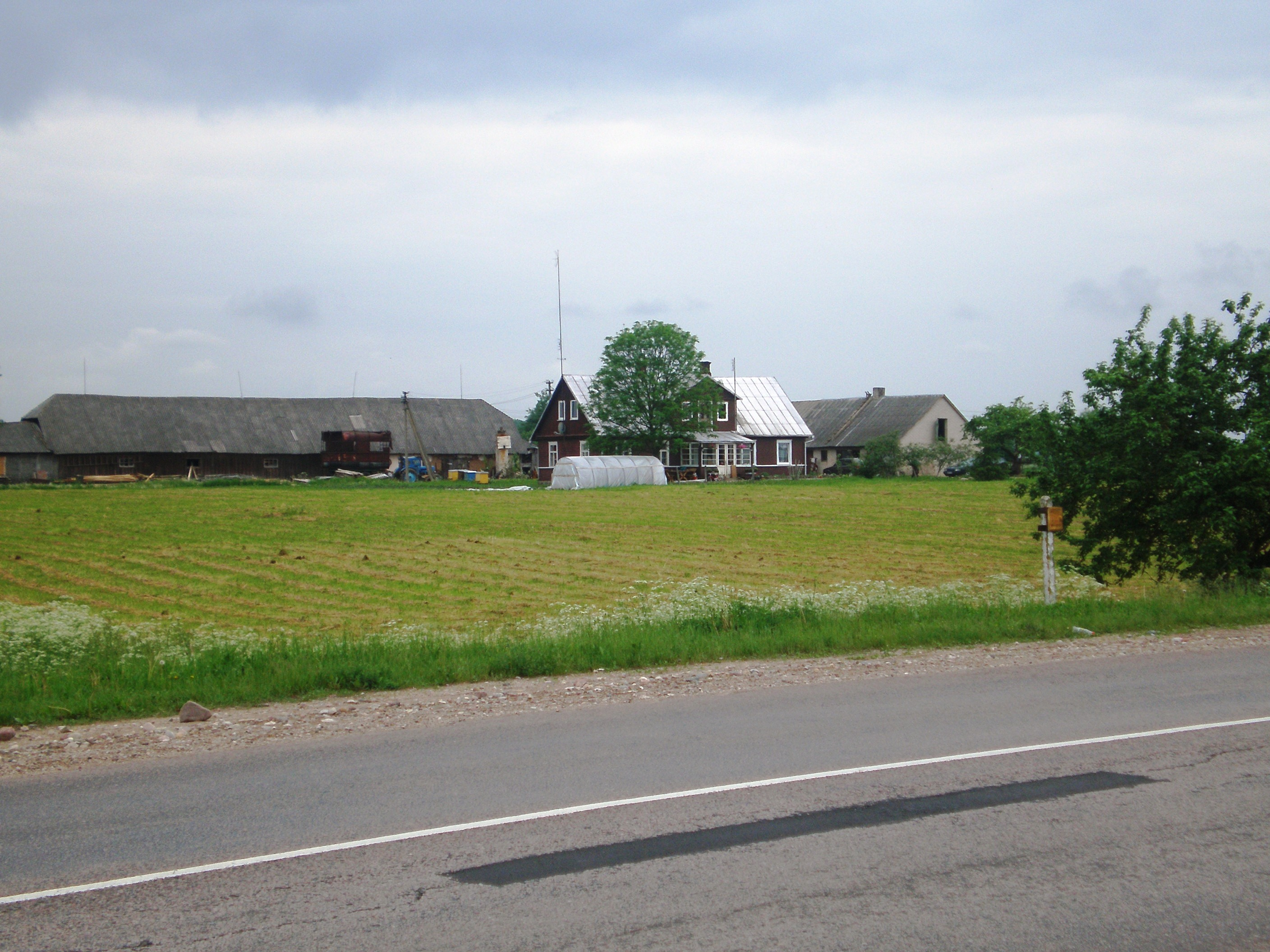 Urnėžiai, Fotografavimo data: 2007.06.01